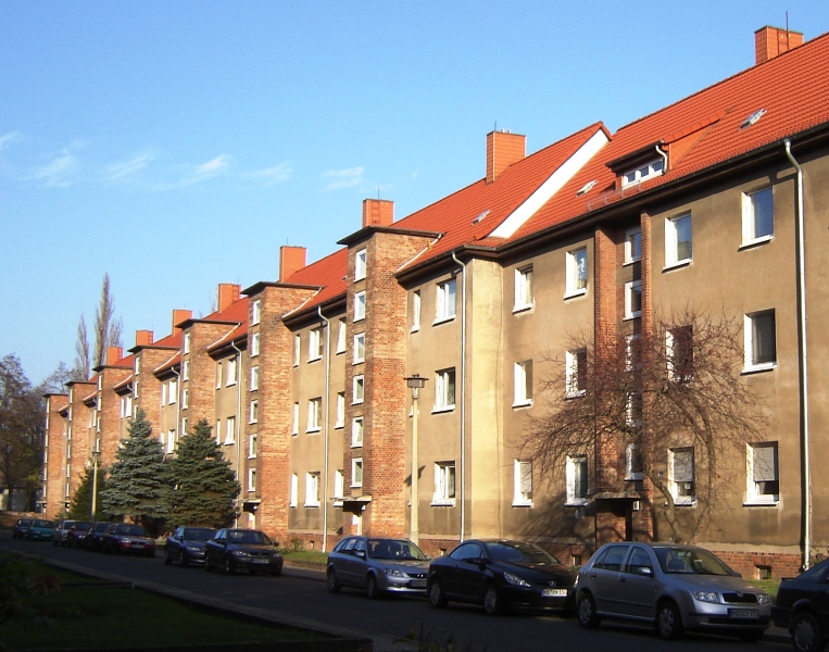 Magdeburg-Fermersleben, Straße Am Klosterfeld